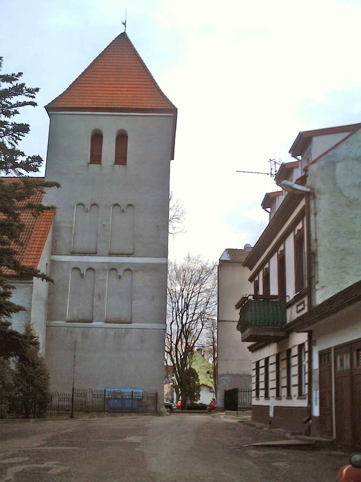 Mrągowo, ul. Kościelna 2 - kościół ewangelicko-augsburski (zabytek nr A-1085 z 6.08.1968)